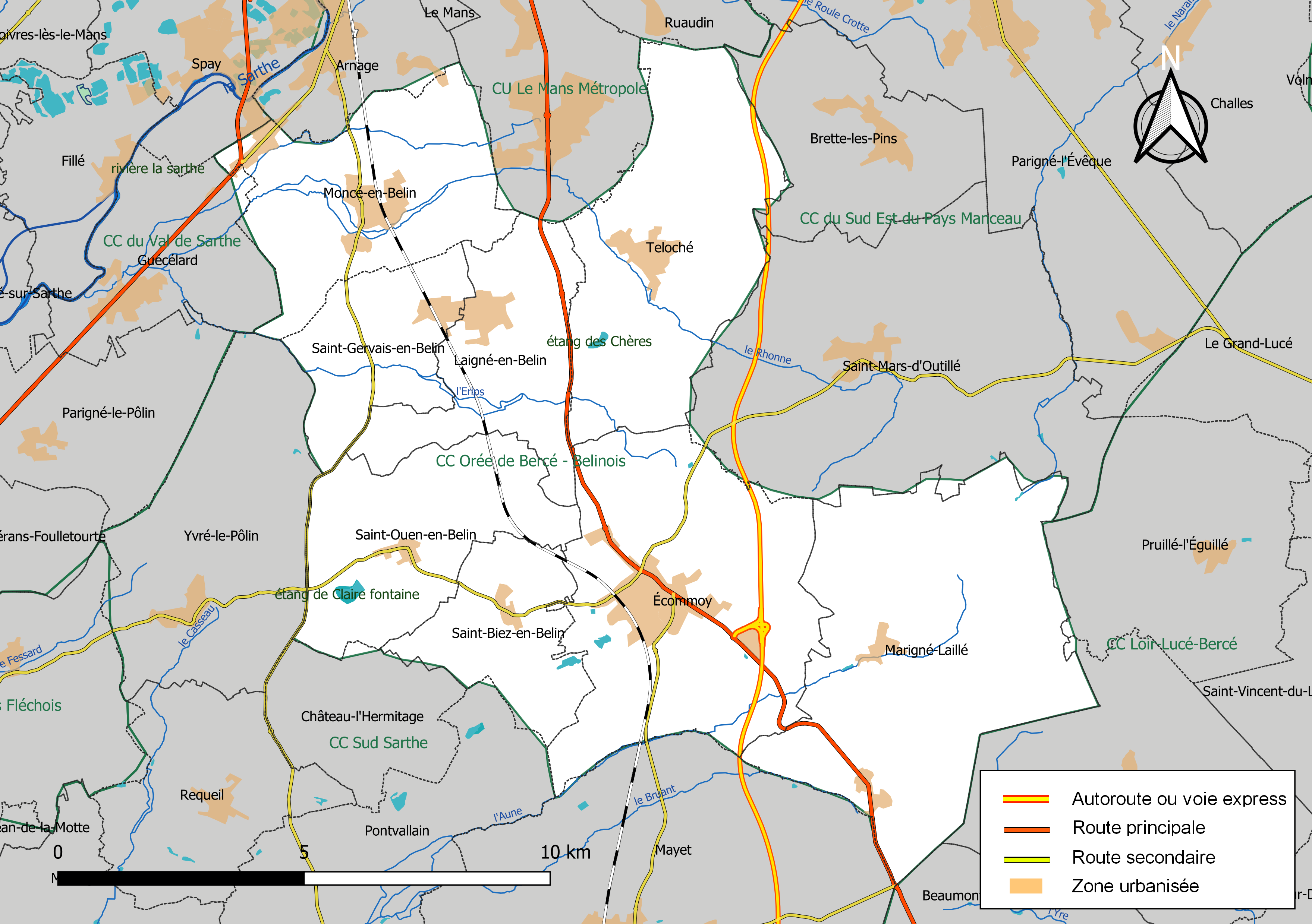 Carte géographique de la Communauté de communes d'Orée de Bercé - Bélinois, département de la Sarthe, France. Composition au 1er janvier 2019.